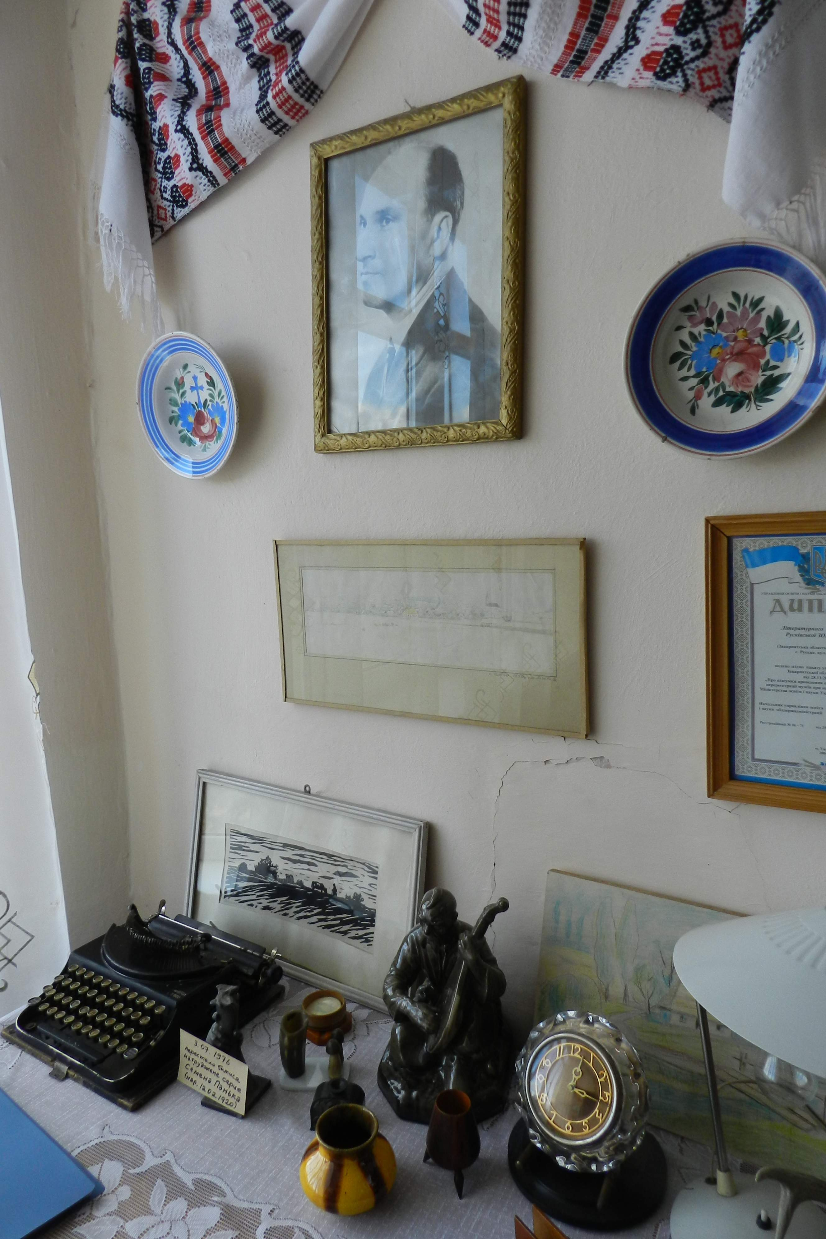 Частина експозиції в Музеї Семена Панька